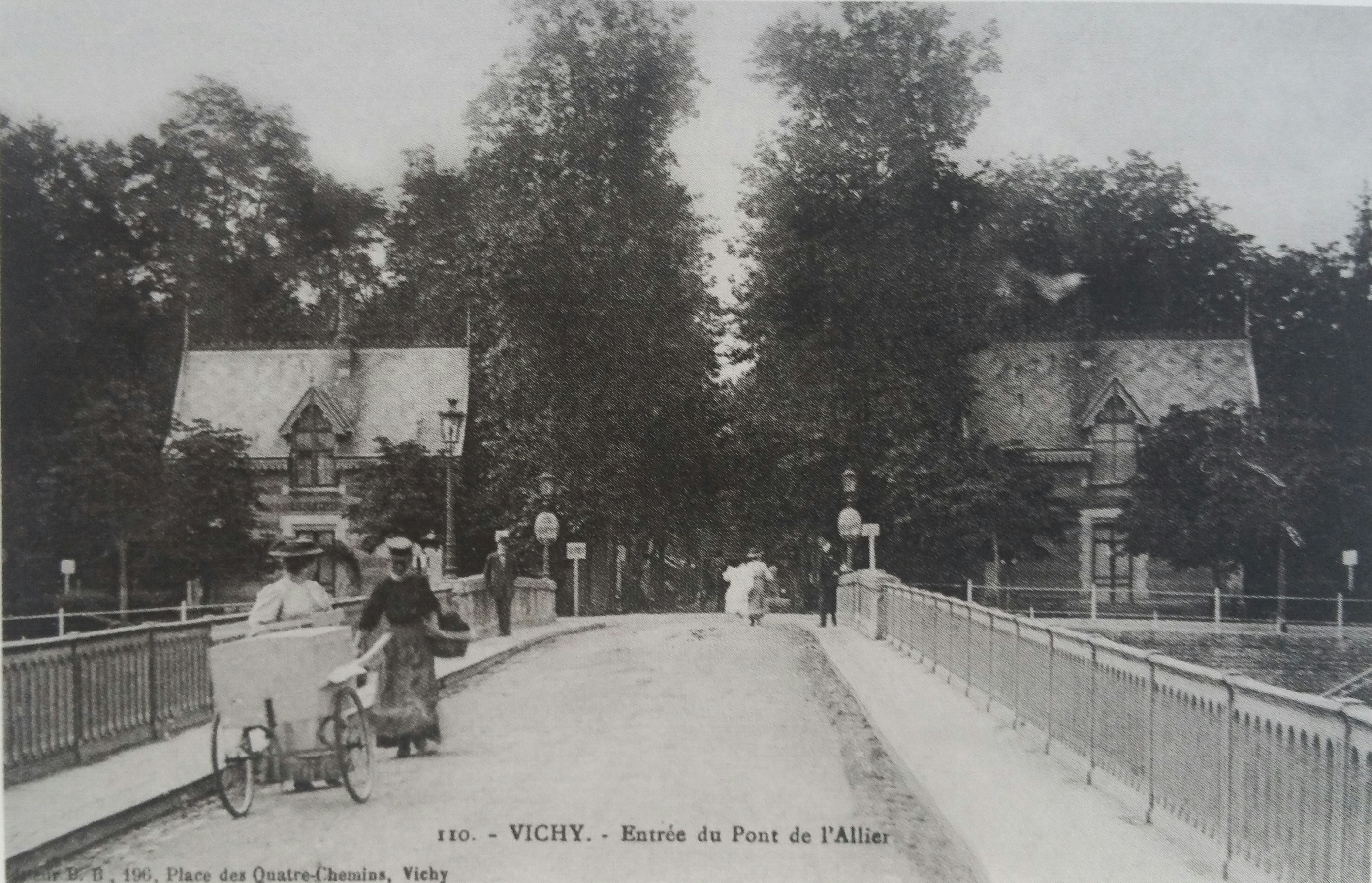 Vue depuis le pont, de l'entrée du pont coté Vichy (rive droite), au début du XXe siècle.